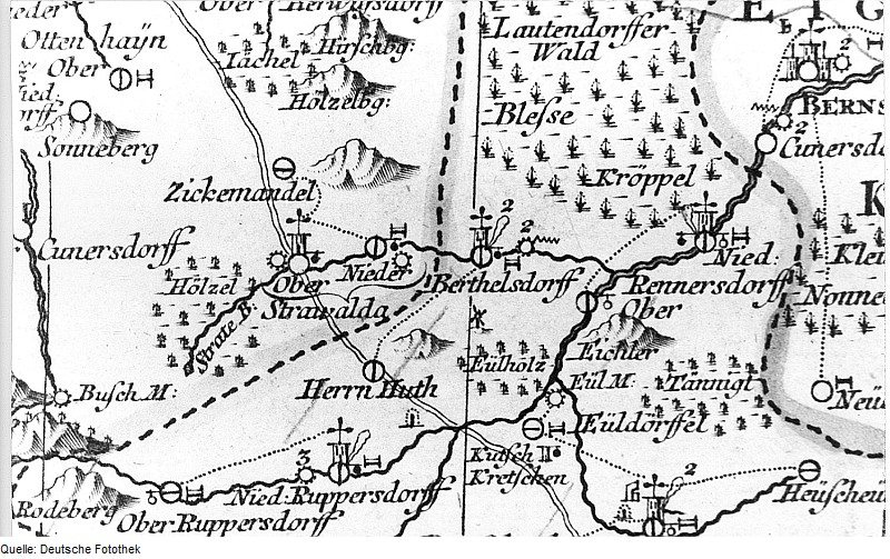 Original image description from the Deutsche Fotothek Strahwalde. Oberlausitzkarte, Schenk, 1759